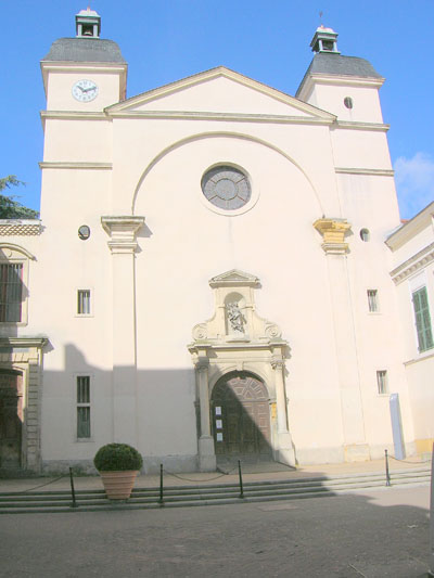 Chapelle Saint Michel Roanne